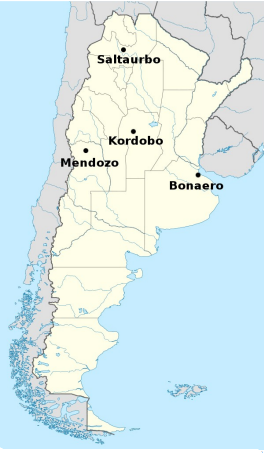 Argentino kun 4 urboj kun esperantaj nomoj